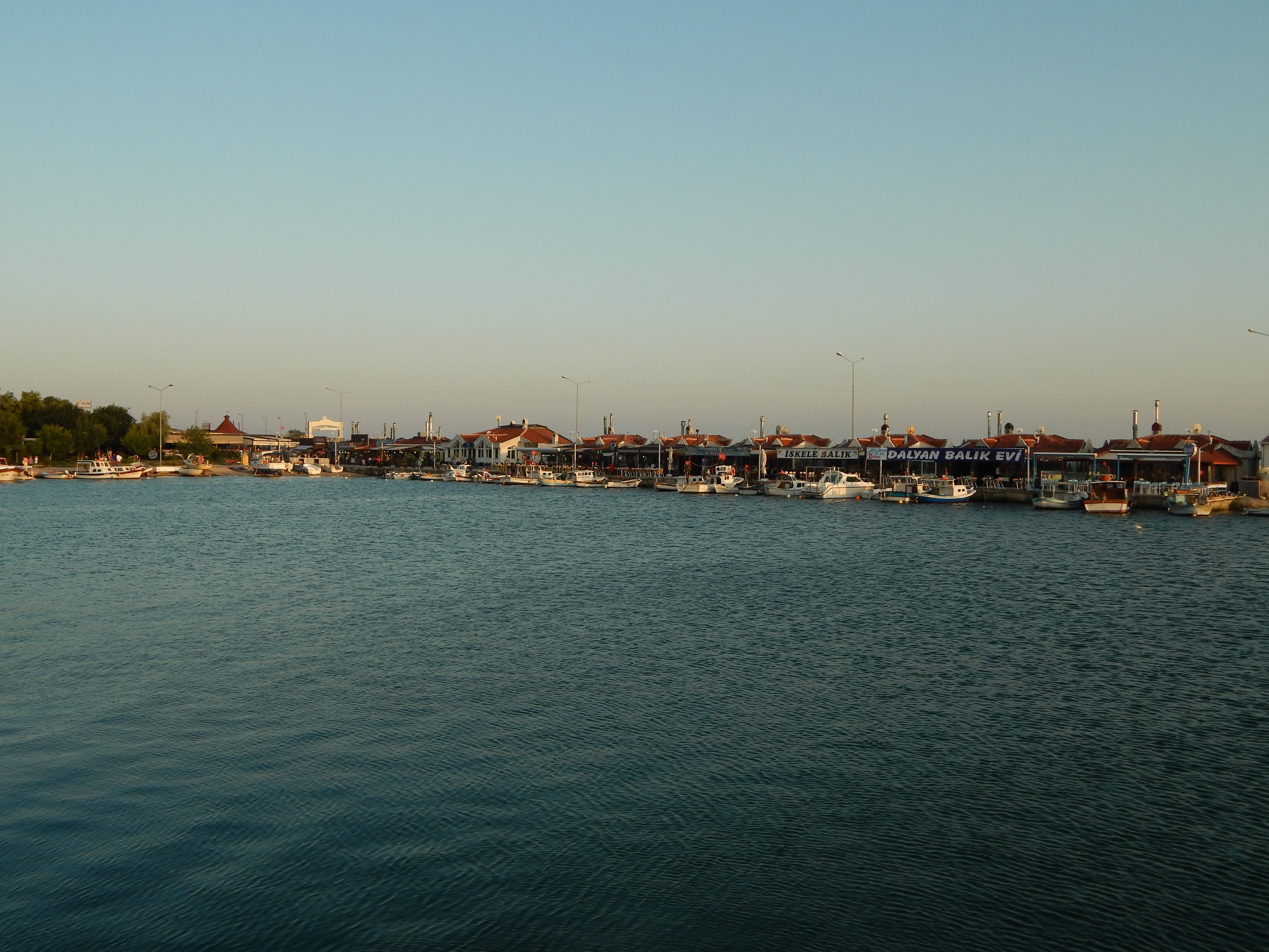 Balık Pazarı...